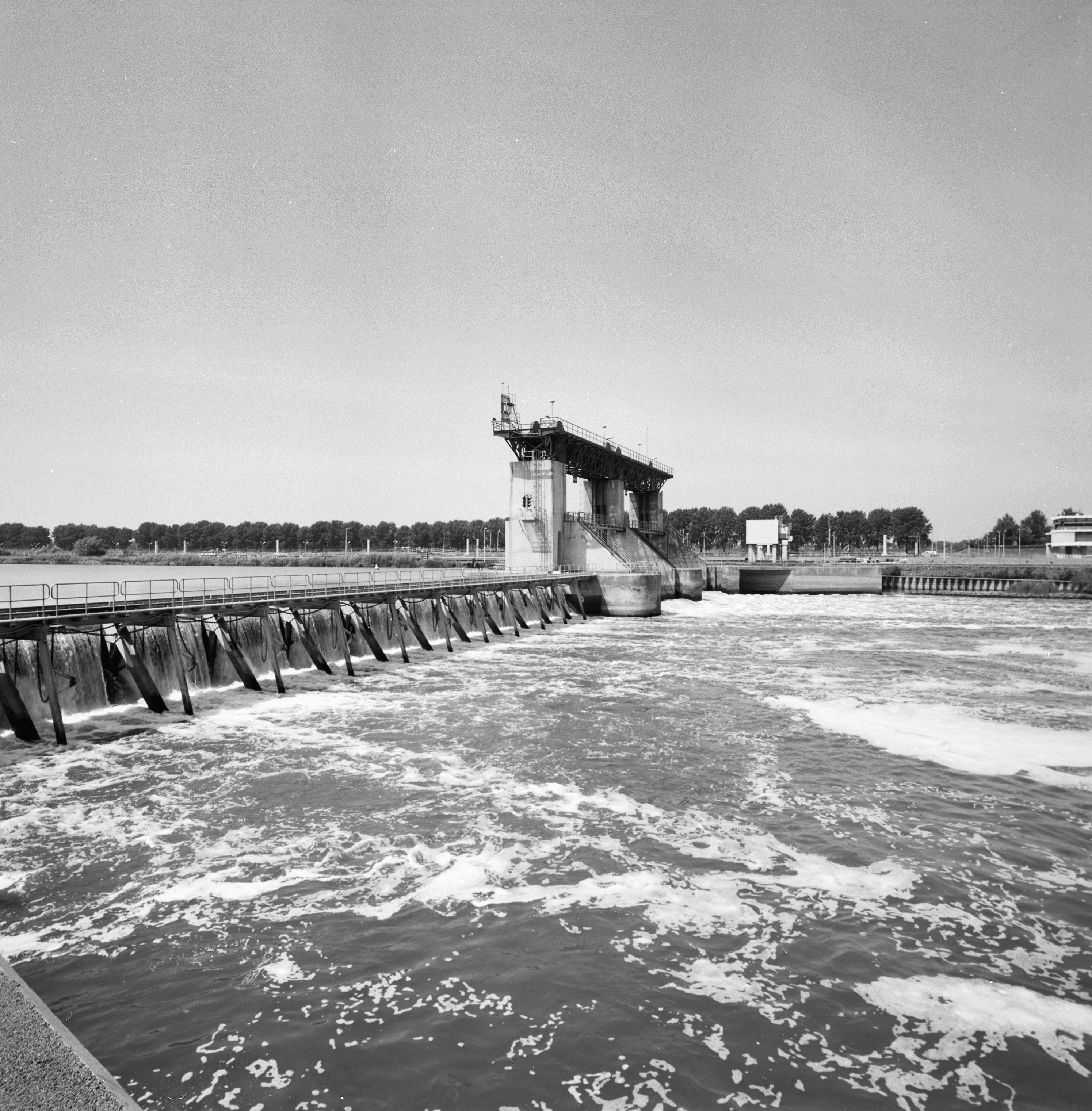 Dakpannenfabriek Janssen-Dings: Overzicht stuw en sluis complex in de Maas (opmerking: Gefotografeerd voor Monumenten In Nederland Limburg)